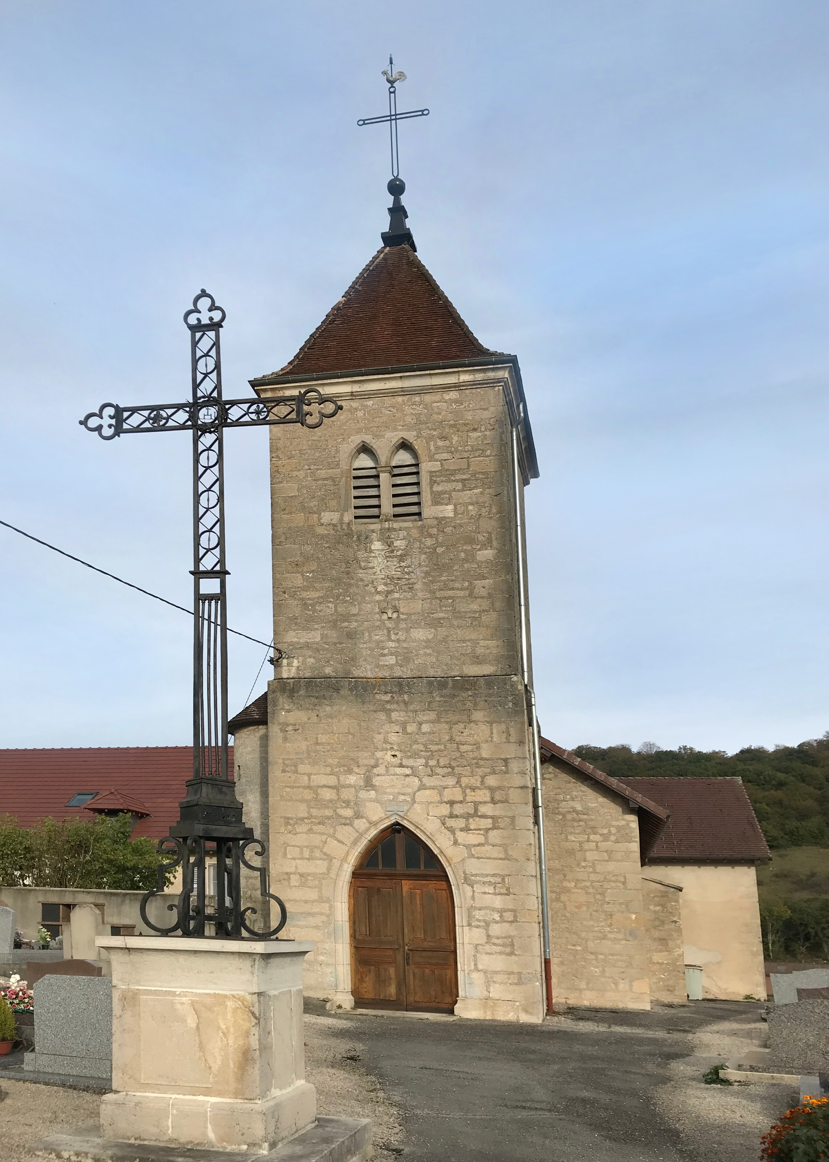 Rothonay (Jura, France) en octobre 2017.